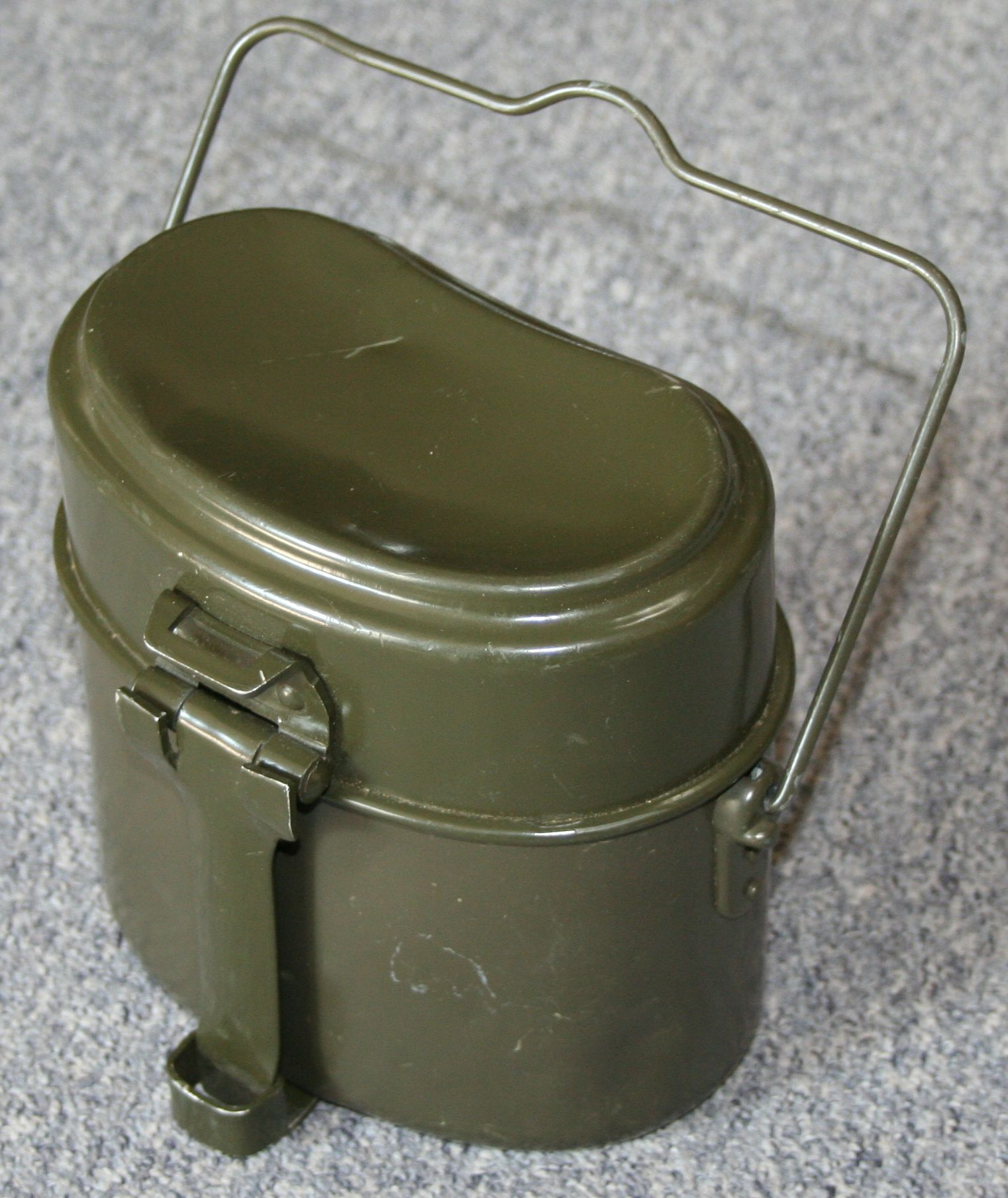 Henkelmann aus Metall (Bundeswehr ca. 80er Jahre)